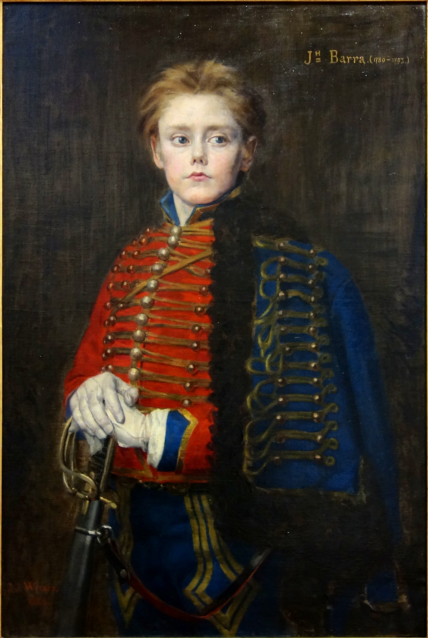 Portrait de Joseph Bara au Musée d'Art et d'Industrie de Roubaix.